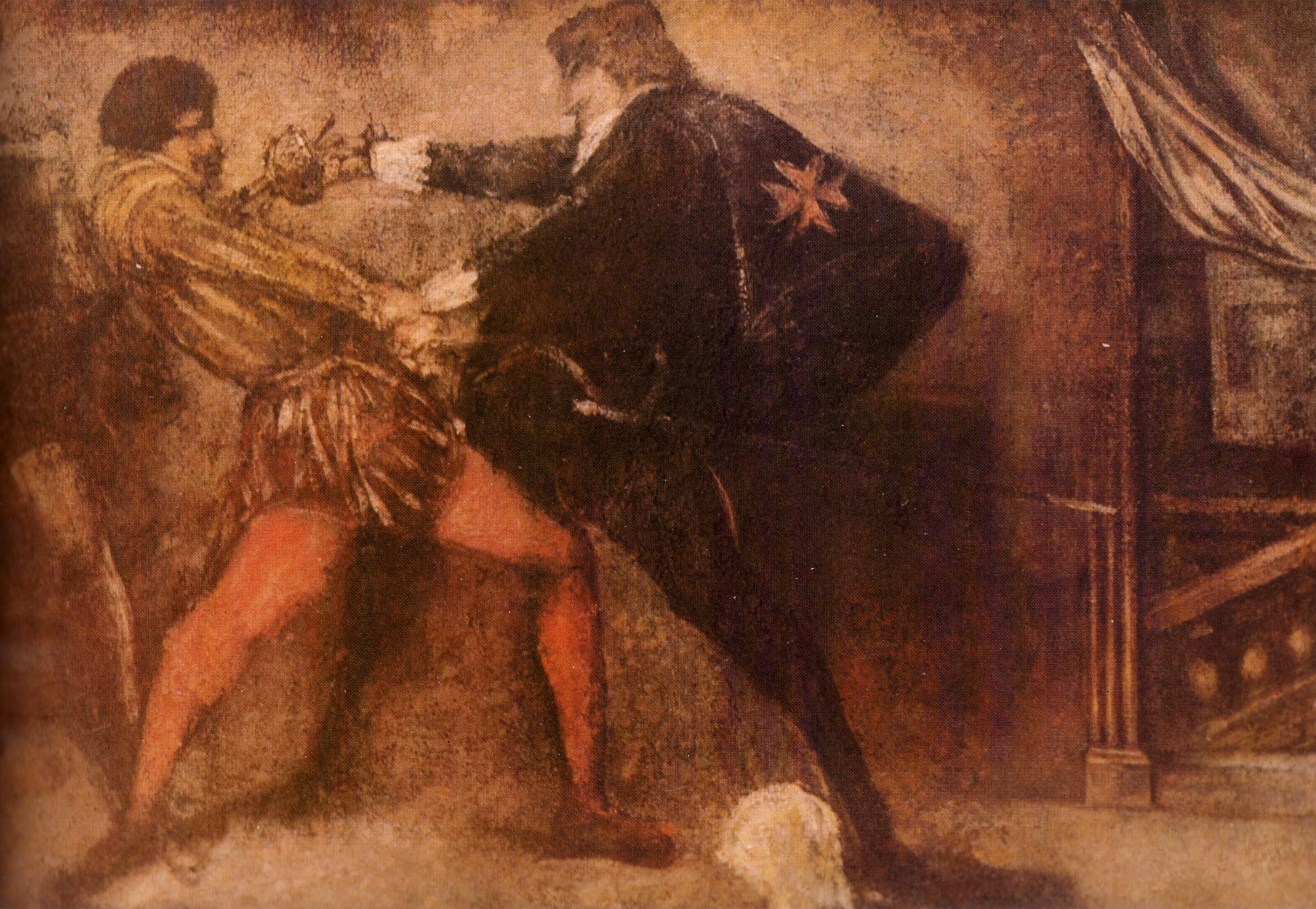 Le Duel